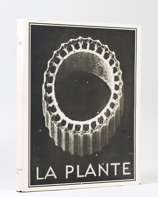 La Plante par Karl Blossfeldt, édition française de Urformen der Kunst, publiée à Paris en 1929 (A. Calavas éditeur).